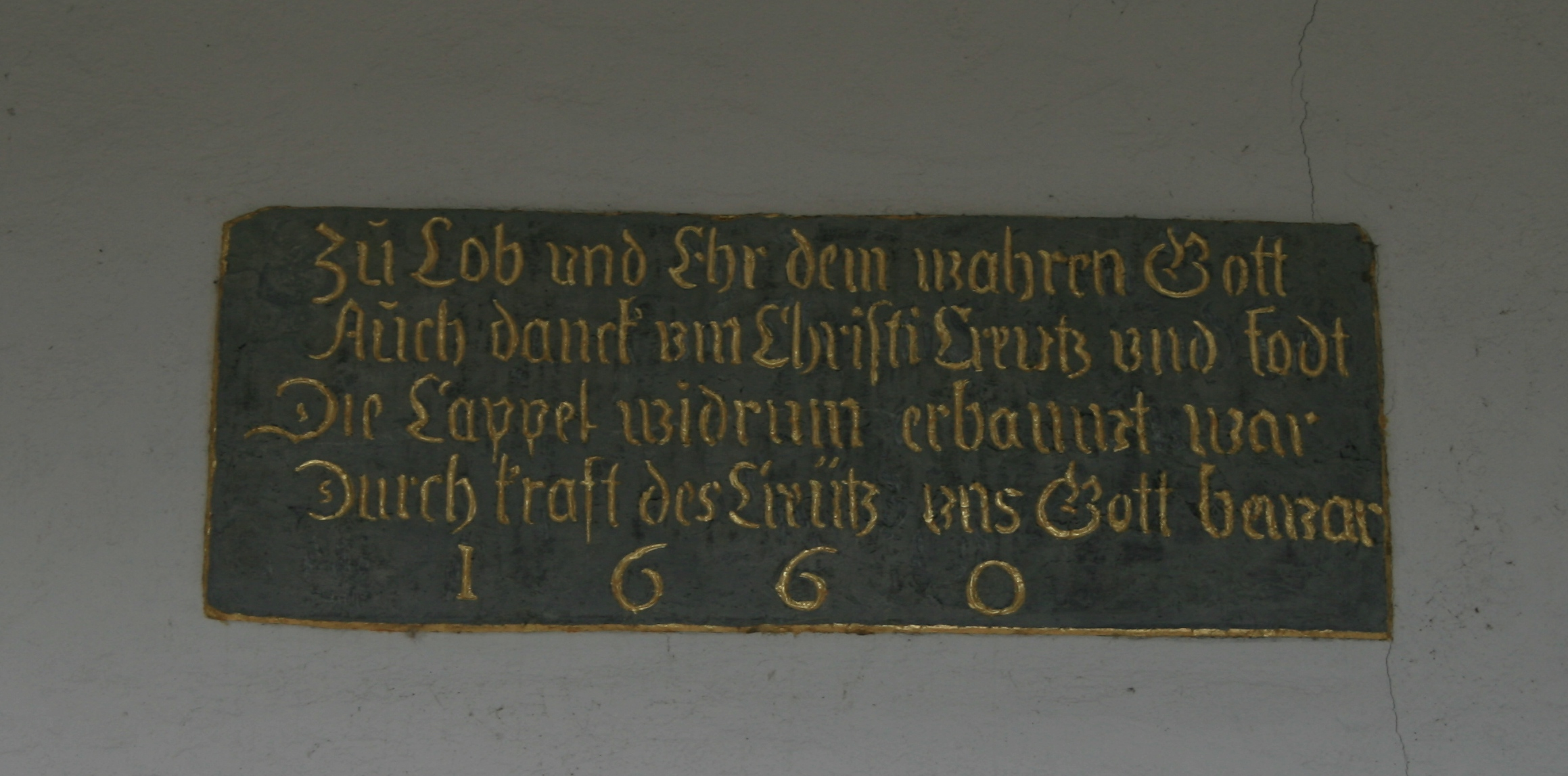 Inschrift von 1660 an der Kreuzkapelle Wettingen, Aargau, Schweiz